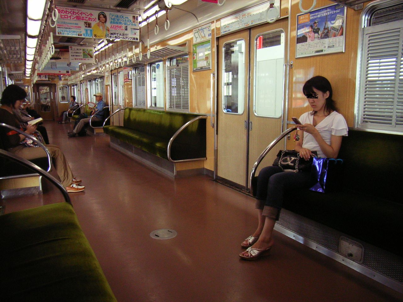 三宮駅停車中の2000系2050形中間車の車内。